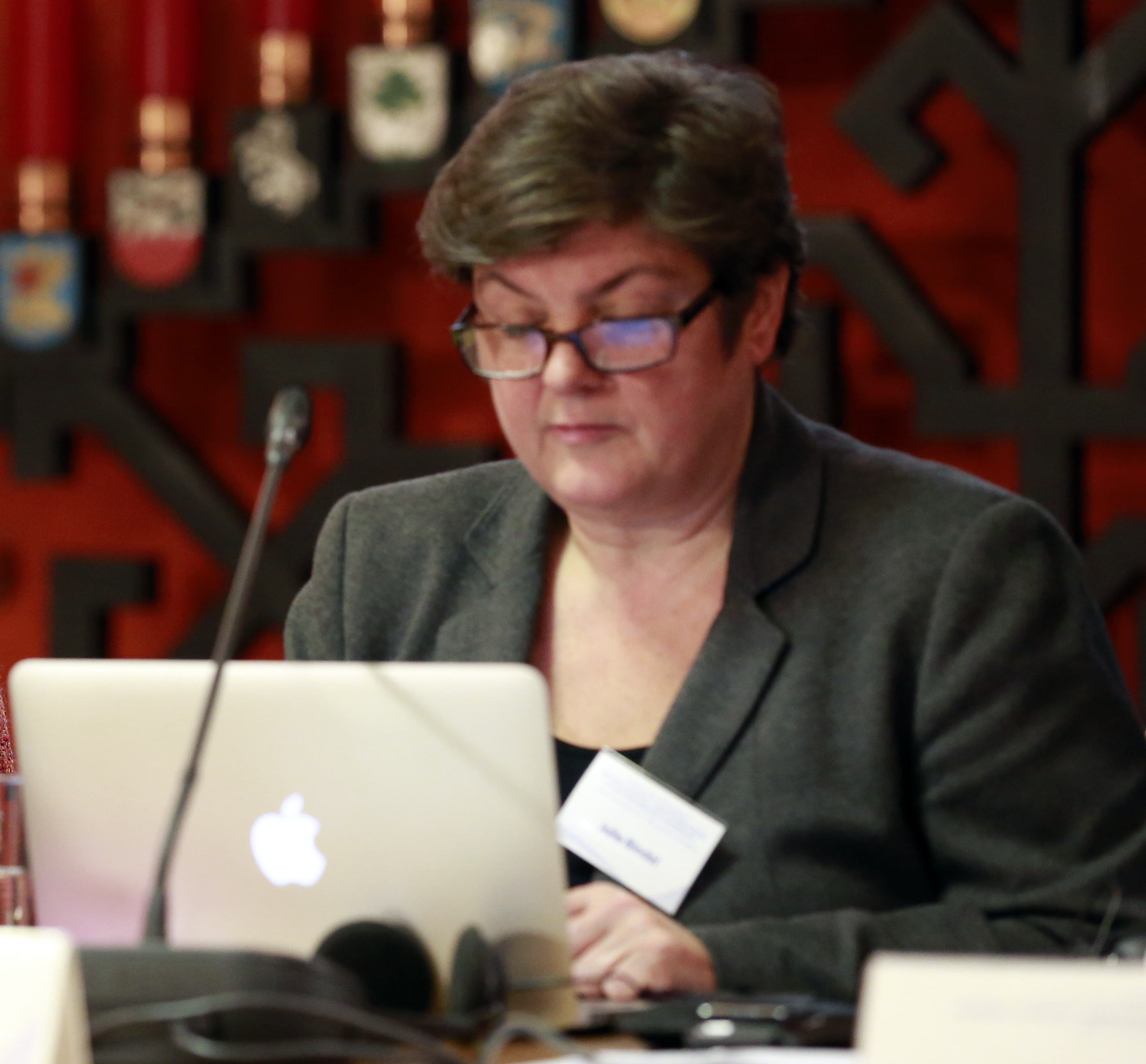 Conference on 26 October 2015: "Drošības kompass – efektīvi risinājumi cilvēktirdzniecības novēršanai".